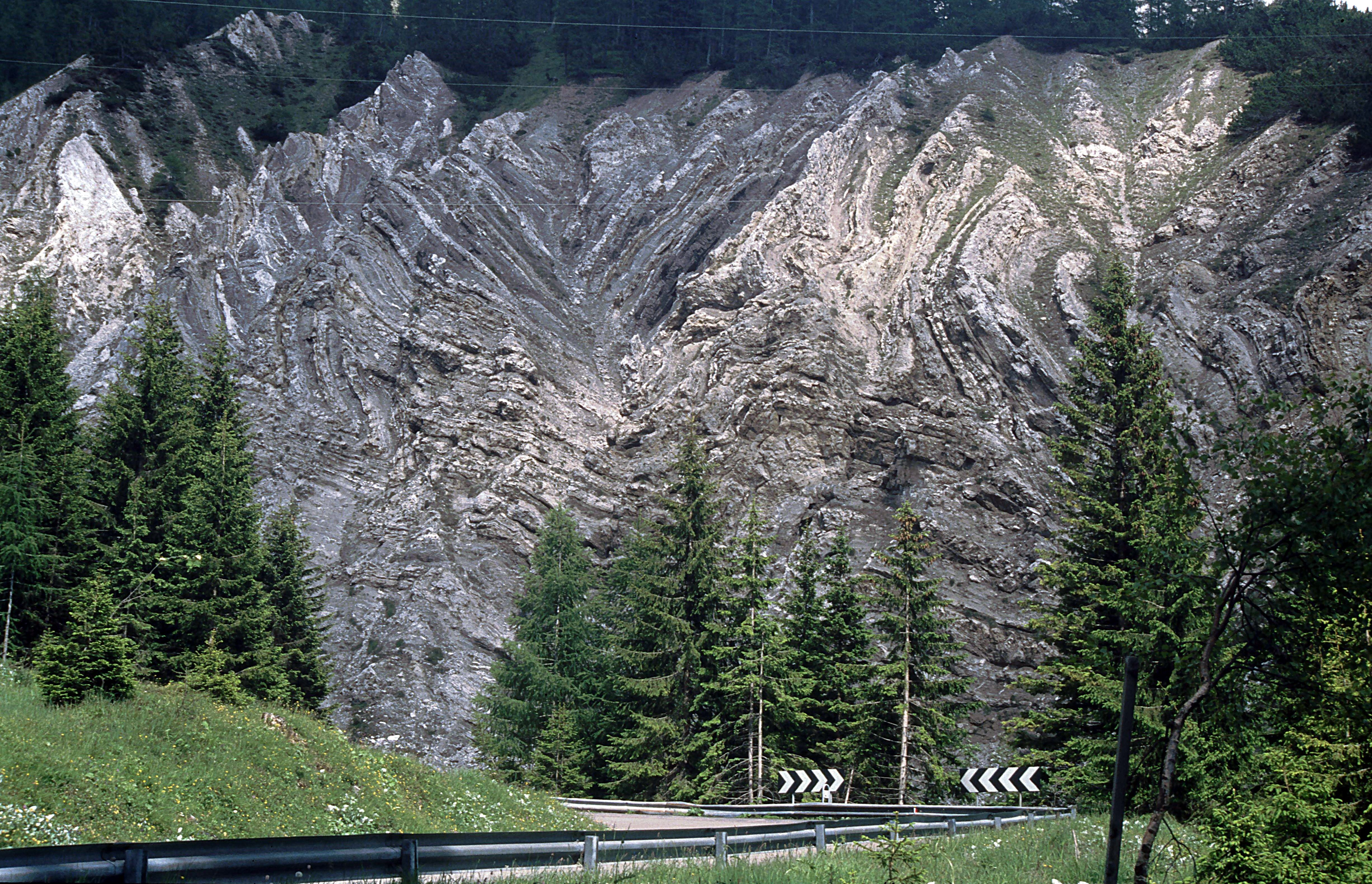 Geologische Formationen am Rollepass